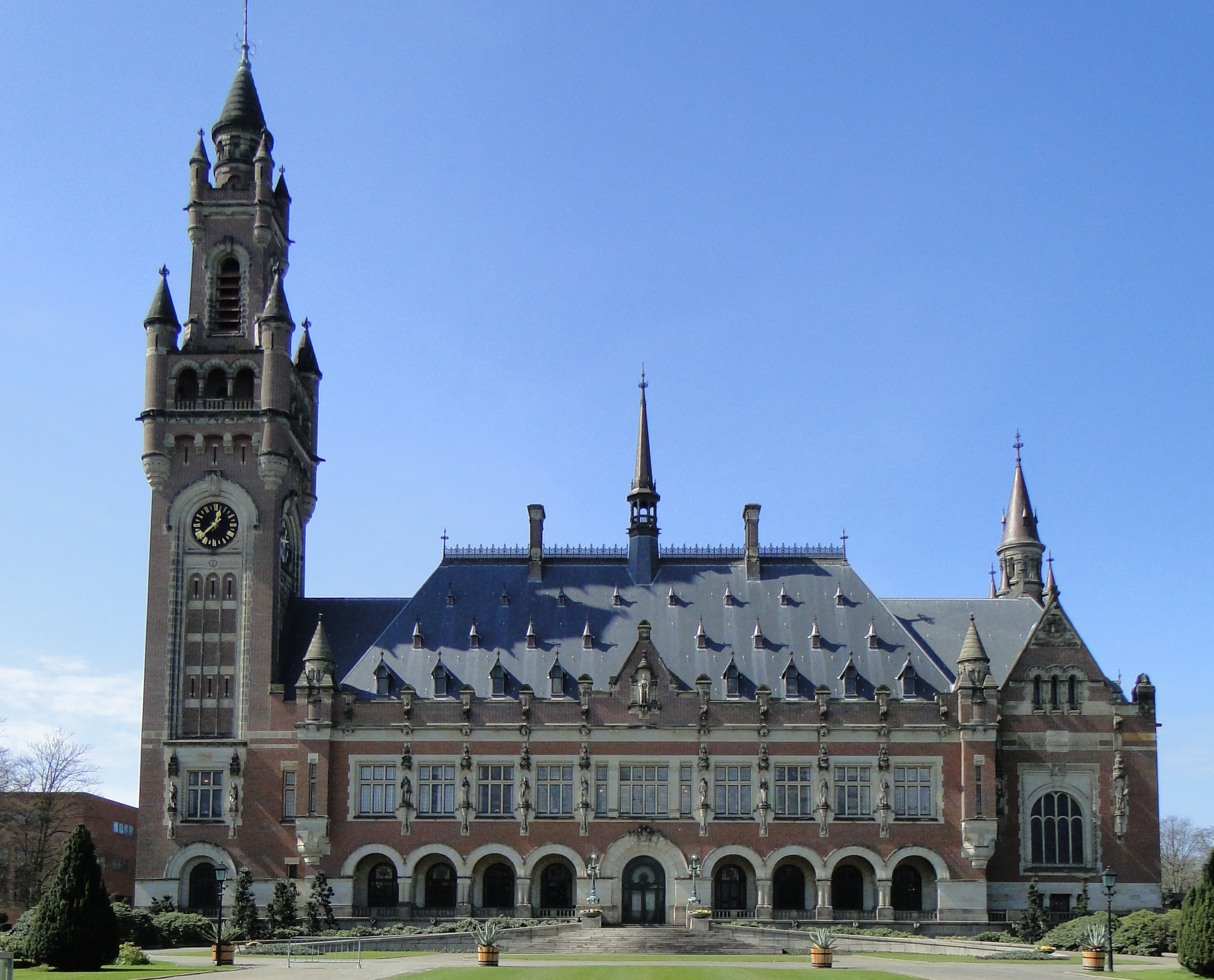 Den Haag